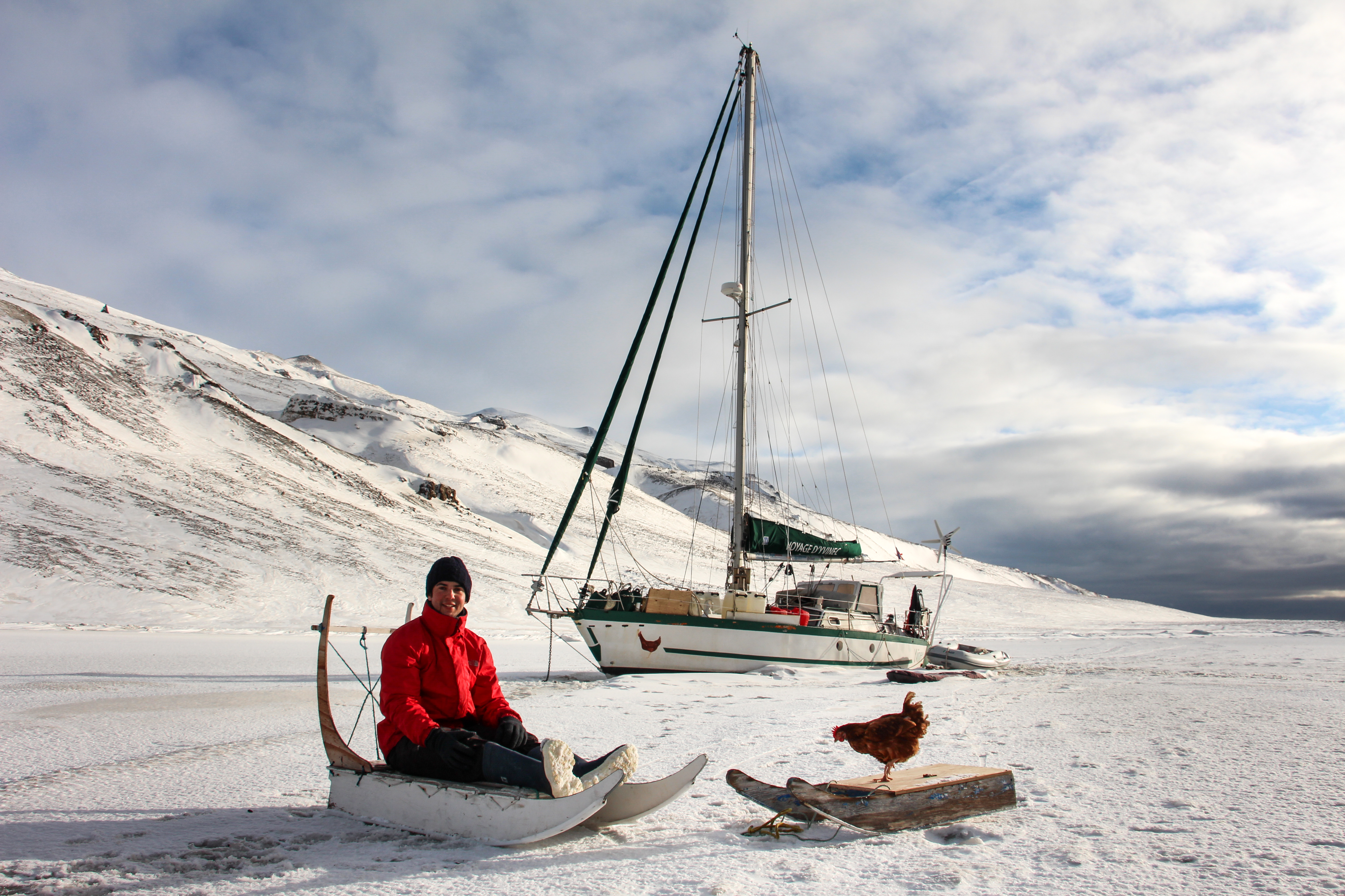 Guriec et monique sur banquise yvinec derriere